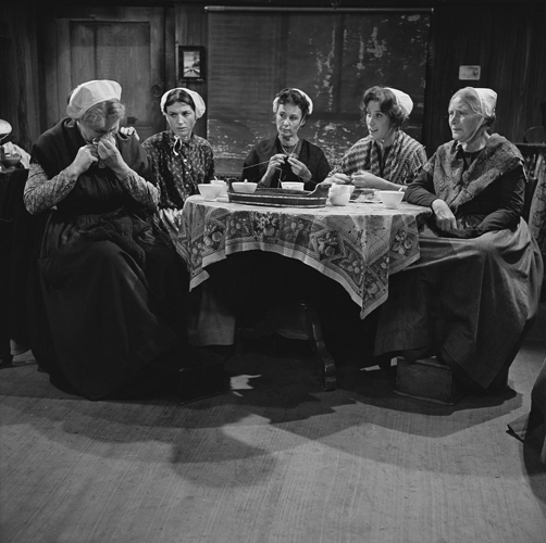 Setfoto van het Nederlandse televisiespel Op Hoop Van Zegen